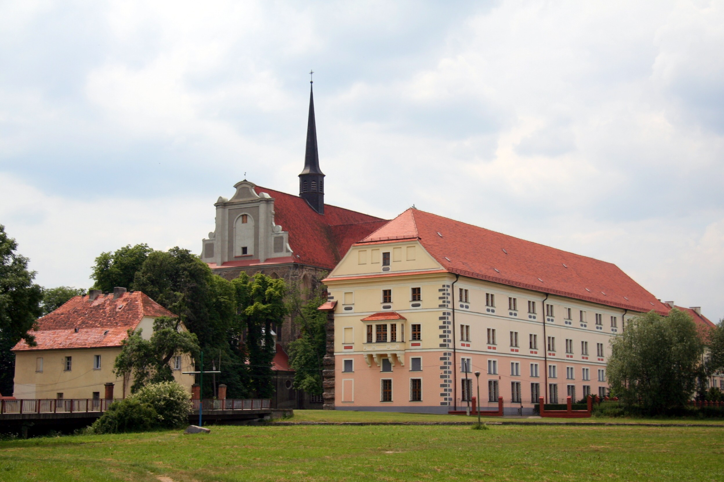 Kloster Kamenz, Niederschlesien